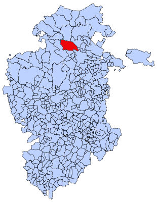 Situación de Merindad de Valdivielso en el mapa de Burgos.